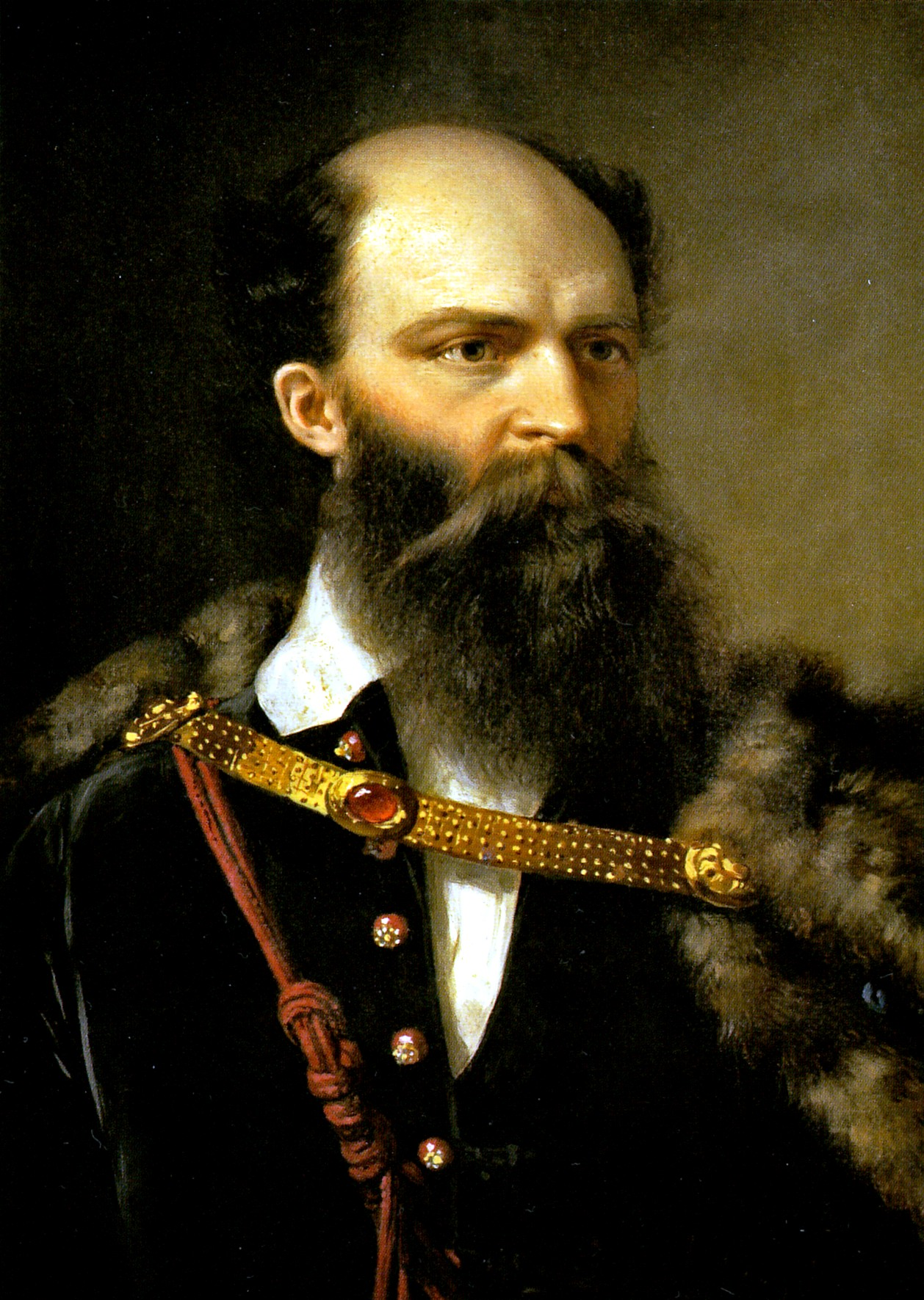 Batthyány Lajos portréja. Barabás Miklós festménye